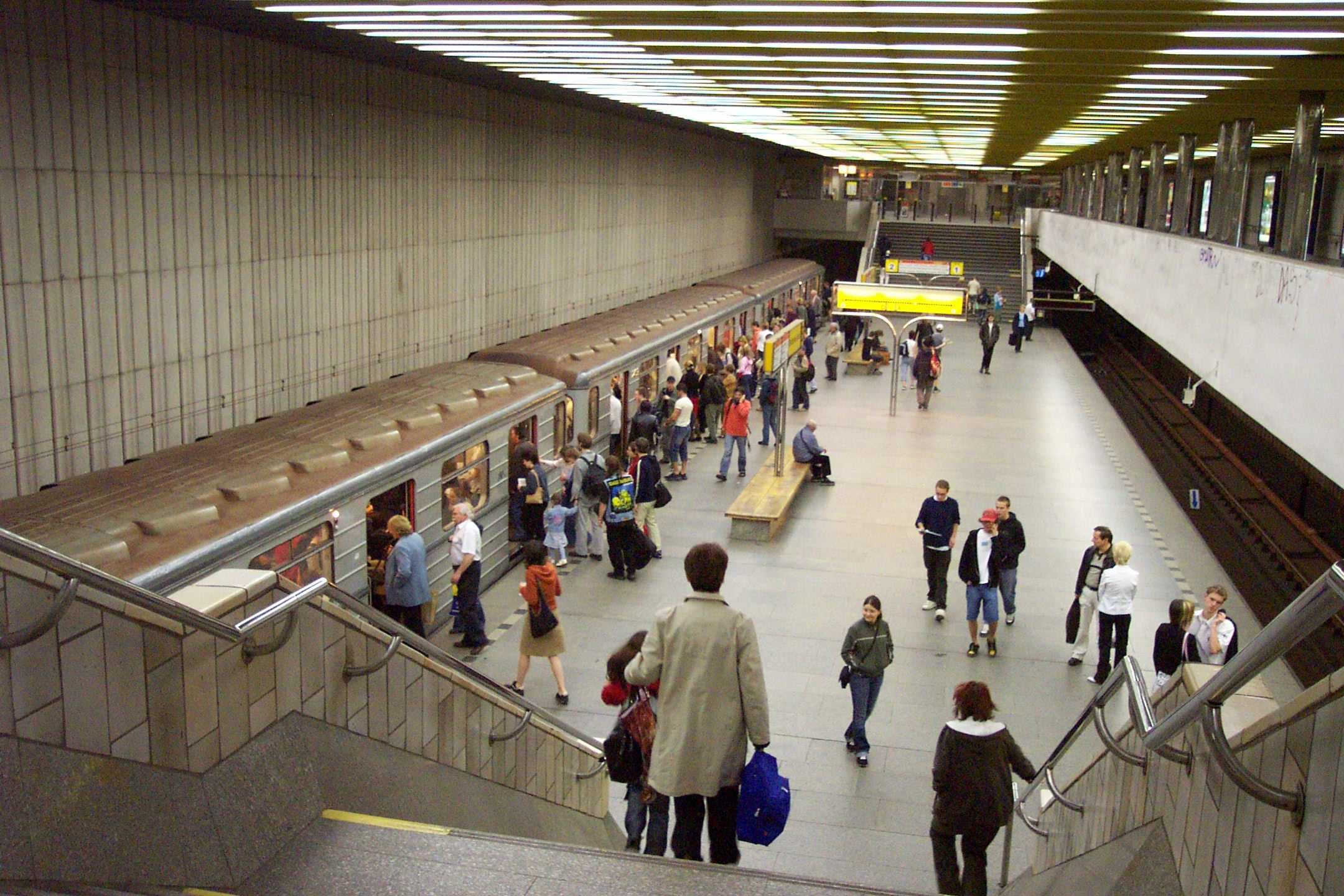 Metro station Smíchovské nádraží in Prague - Stanice metra Smíchovské nádraží